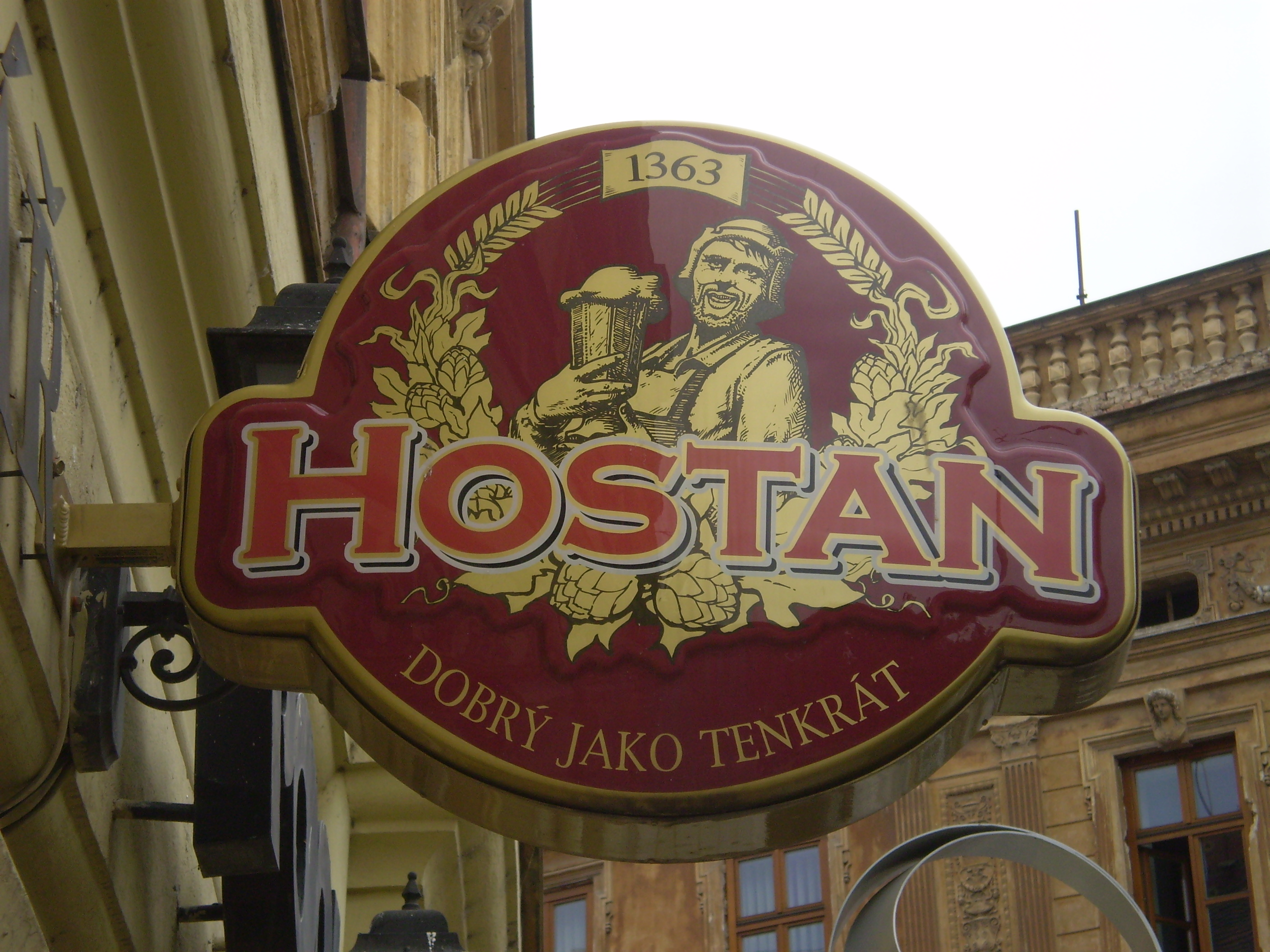 Hostan, hospoda Pool ve Znojmě.